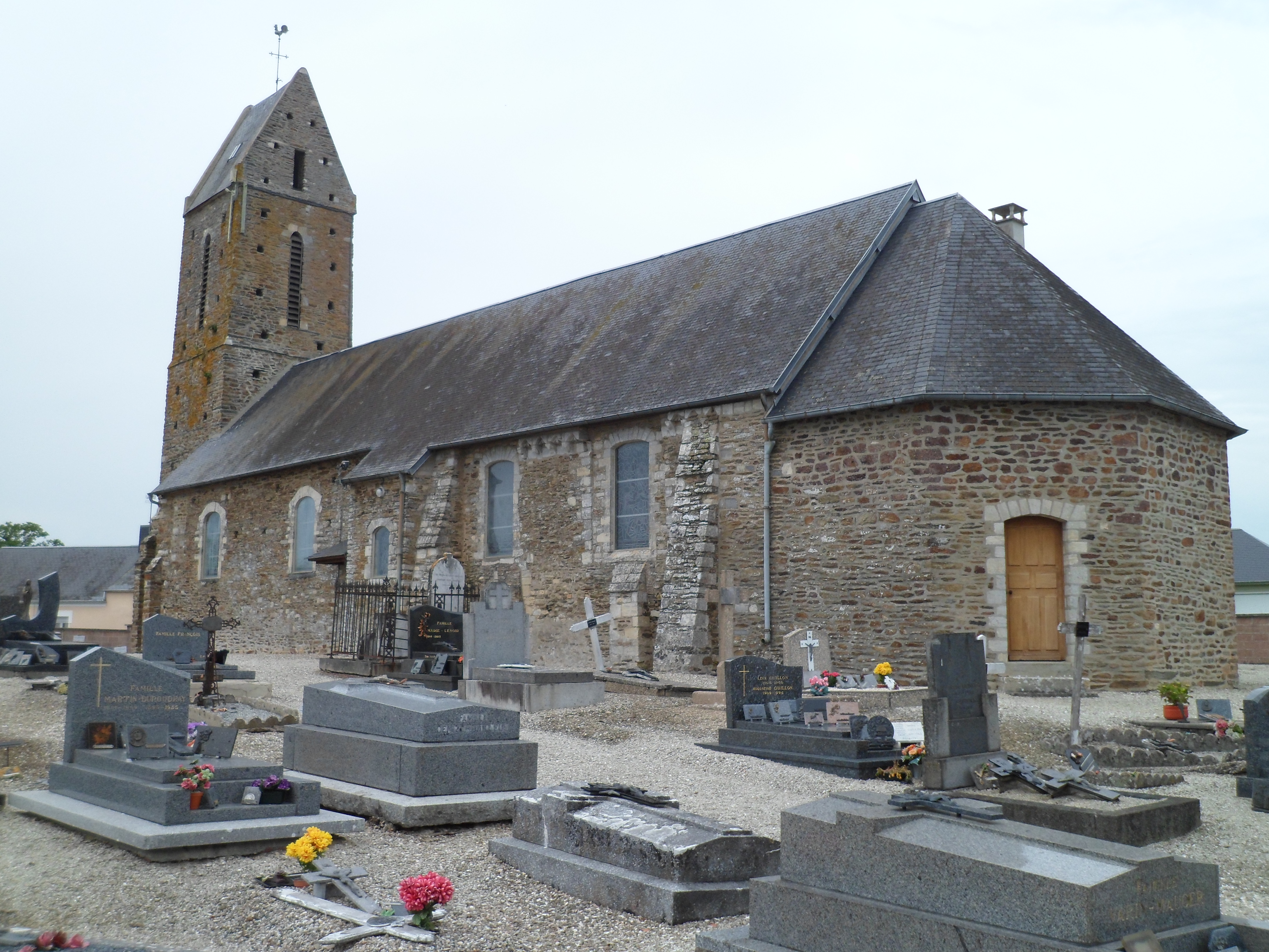 Église Saint-Pierre de Biéville